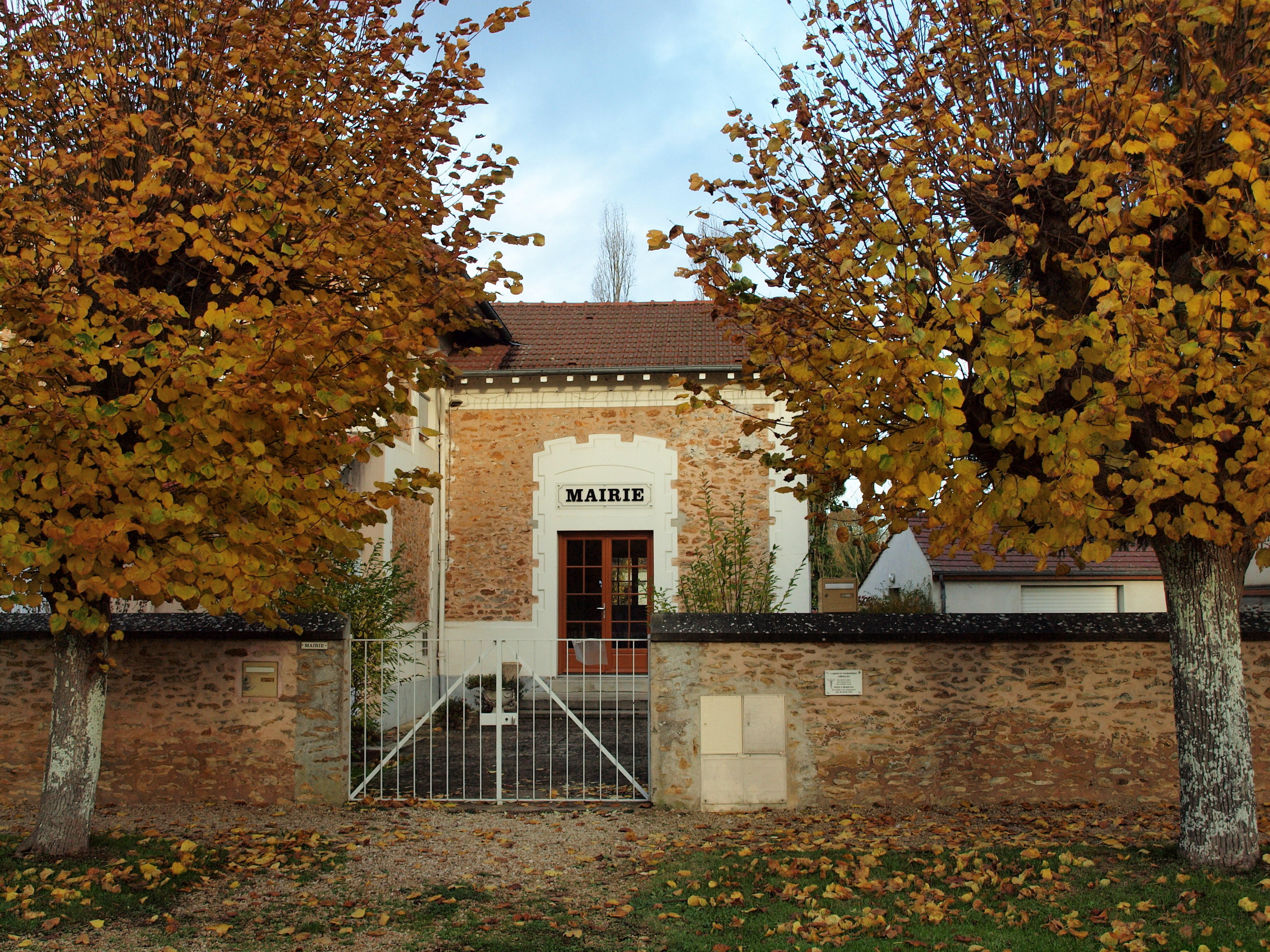 Mairie de Courquetaine (Seine-et-Marne, France)